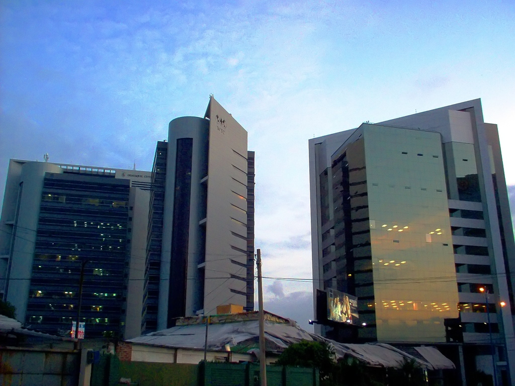 WTC Guayaquil